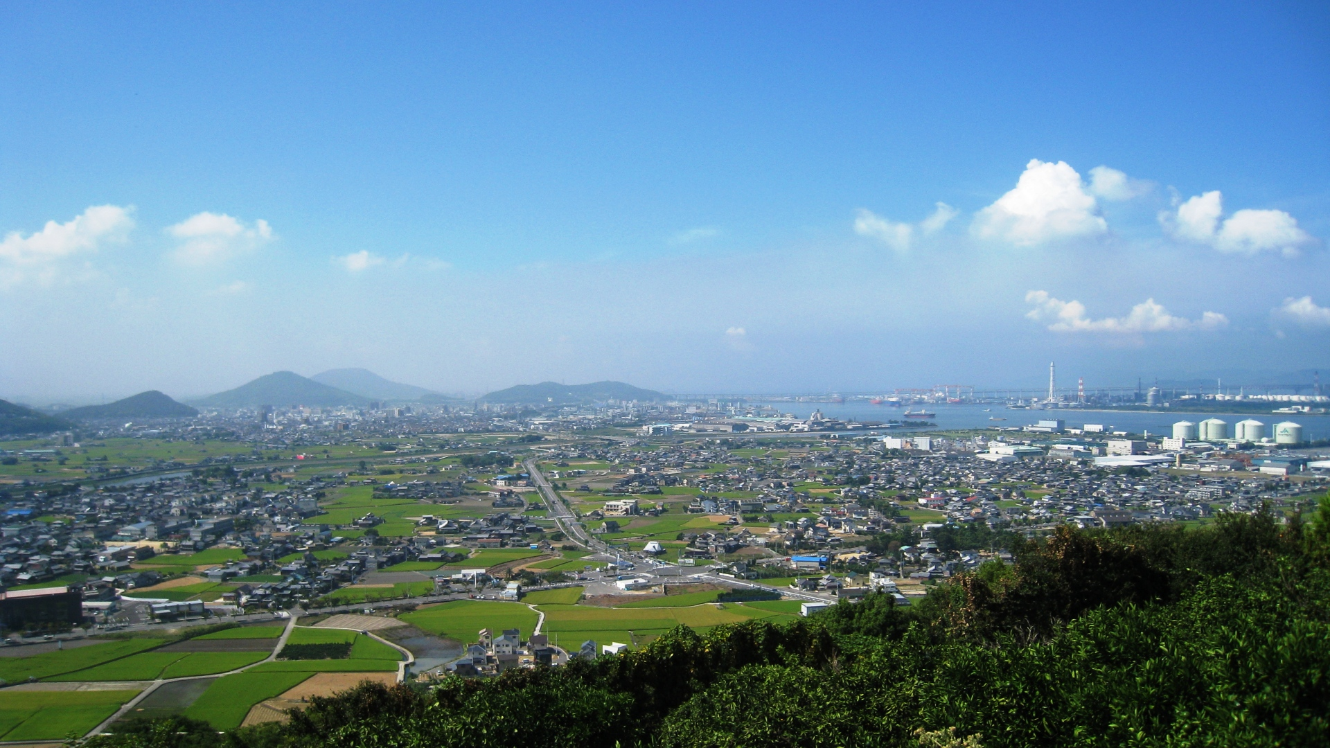 香川県坂出市雄山から望む市内の様子。海沿いは臨海工業地帯で、奥が坂出市中心部。